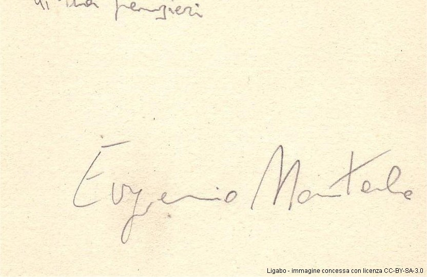 Firma di Eugenio Montale su documento autografo